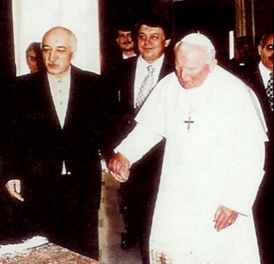 Fethullah Gülen beim Papst in 1998